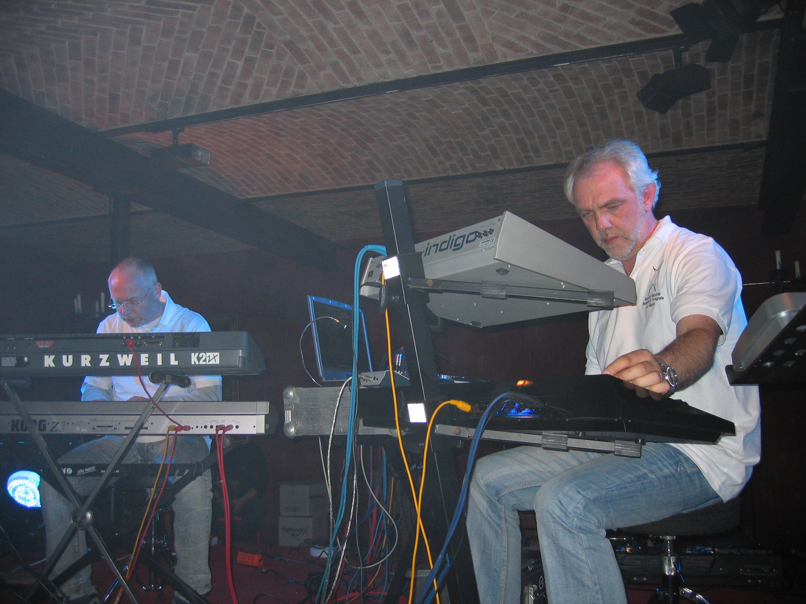 Die Band Rainbow Serpent während ihres Auftrittes in der Burg Satzvey, April 2008